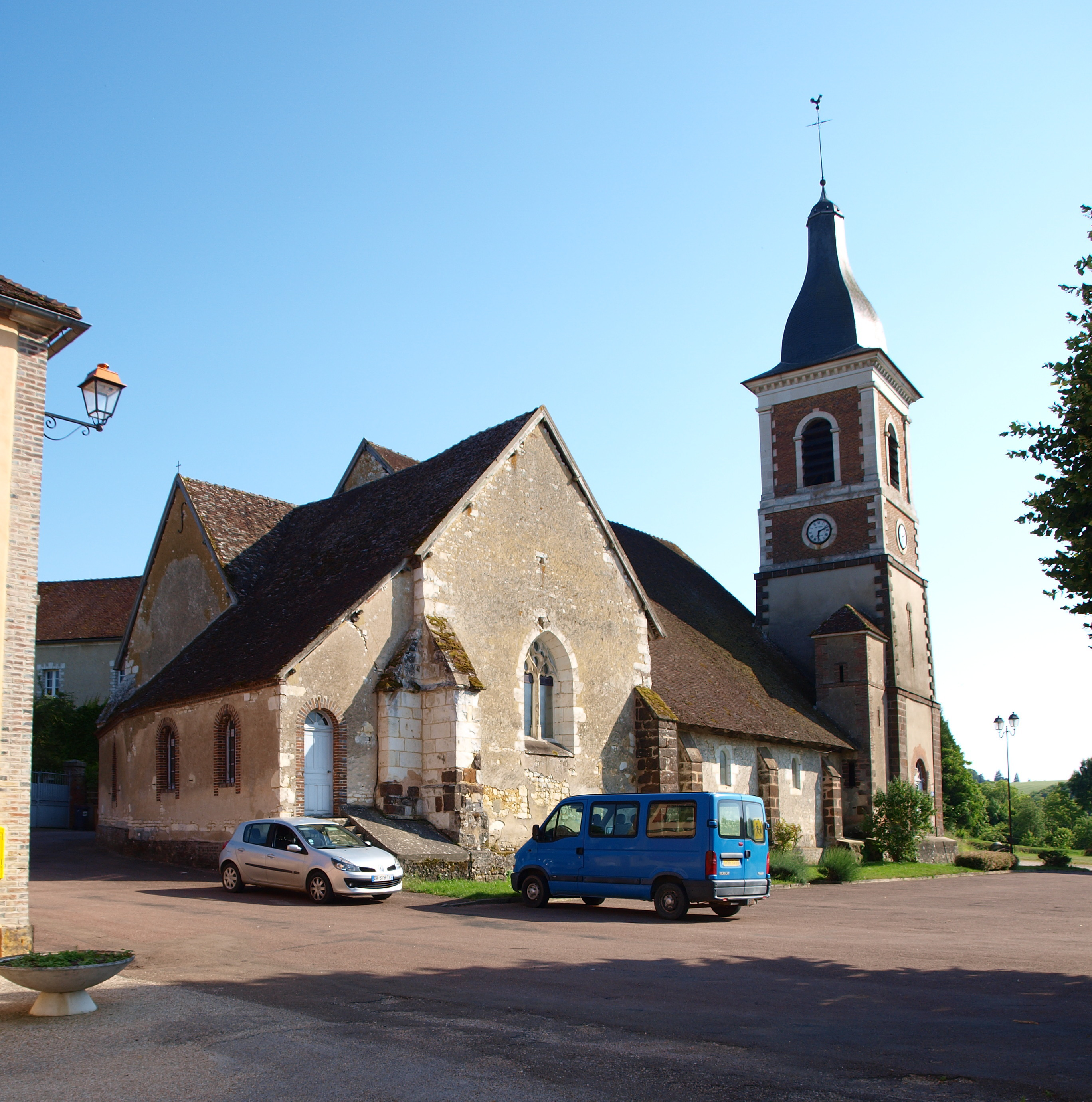 Merry-la-Vallée (Yonne, France)